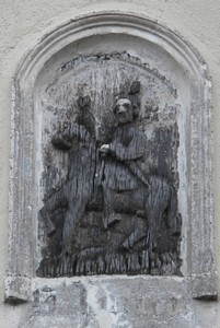 autre version du du Saint Julien qui était autrefois sur le monument de la porte de la Fontaine. Le sabot de droite manque car lorsque selon la légende saint-julien s'est jeté du haut de la colline en arrivant sur le sol le sabot s'est brisé et une source a jaillie. Cette sculpture était autrefois sur la fontaine à la place de la source.